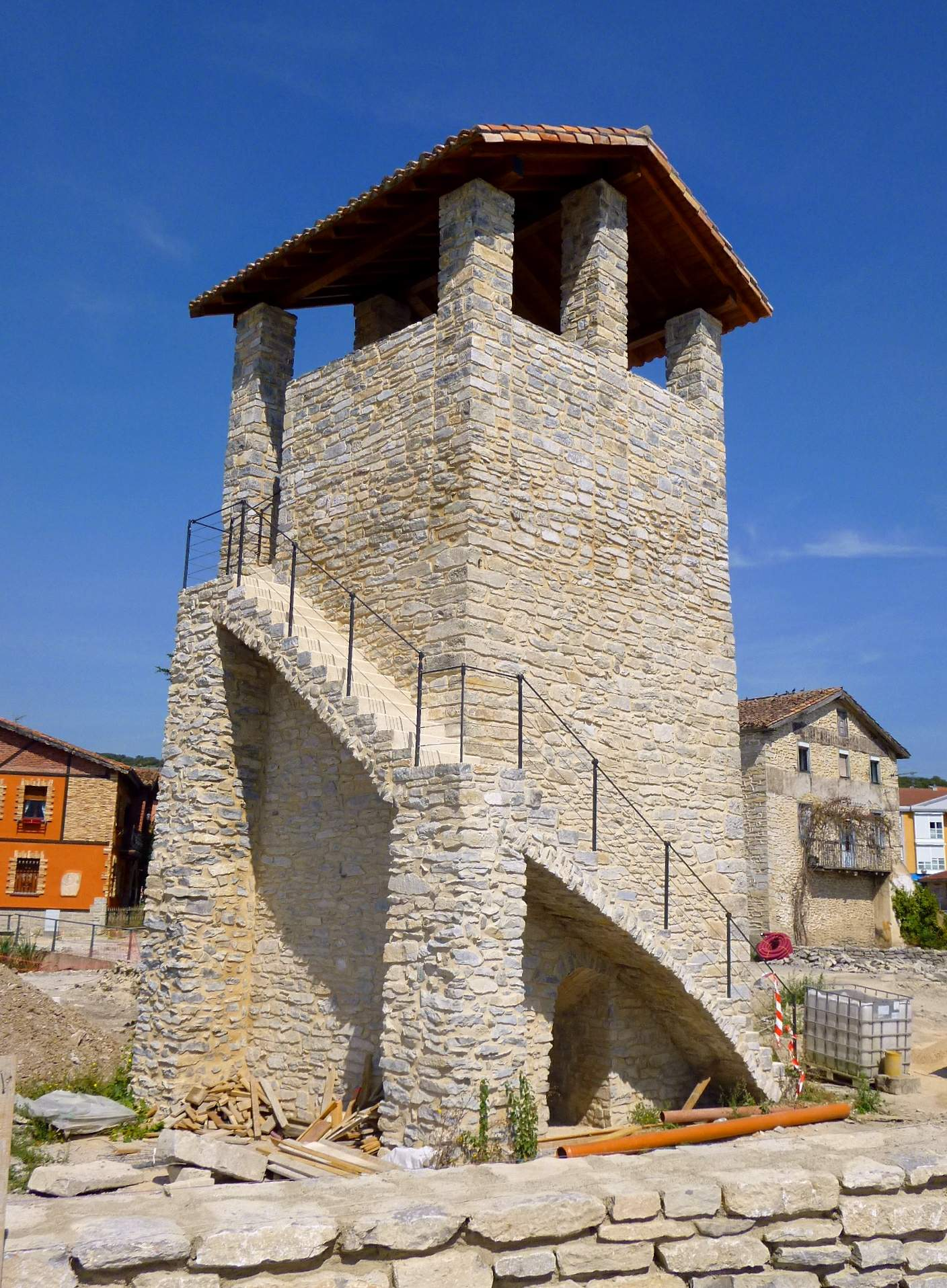 El Calero de Nanclares de la Oca (Álava)